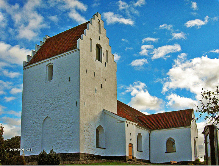 Håstrup kirke, Faaborg Midtfyn, fra sydvest